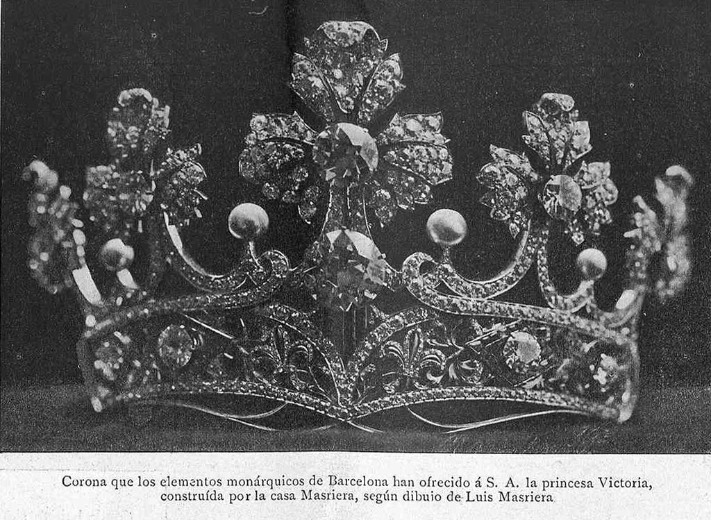 Diadema reial pel dia de la promesa de matrimoni de Victòria Eugènia de Battenberg amb el rei Alfons XIII, obra de Lluís Masriera